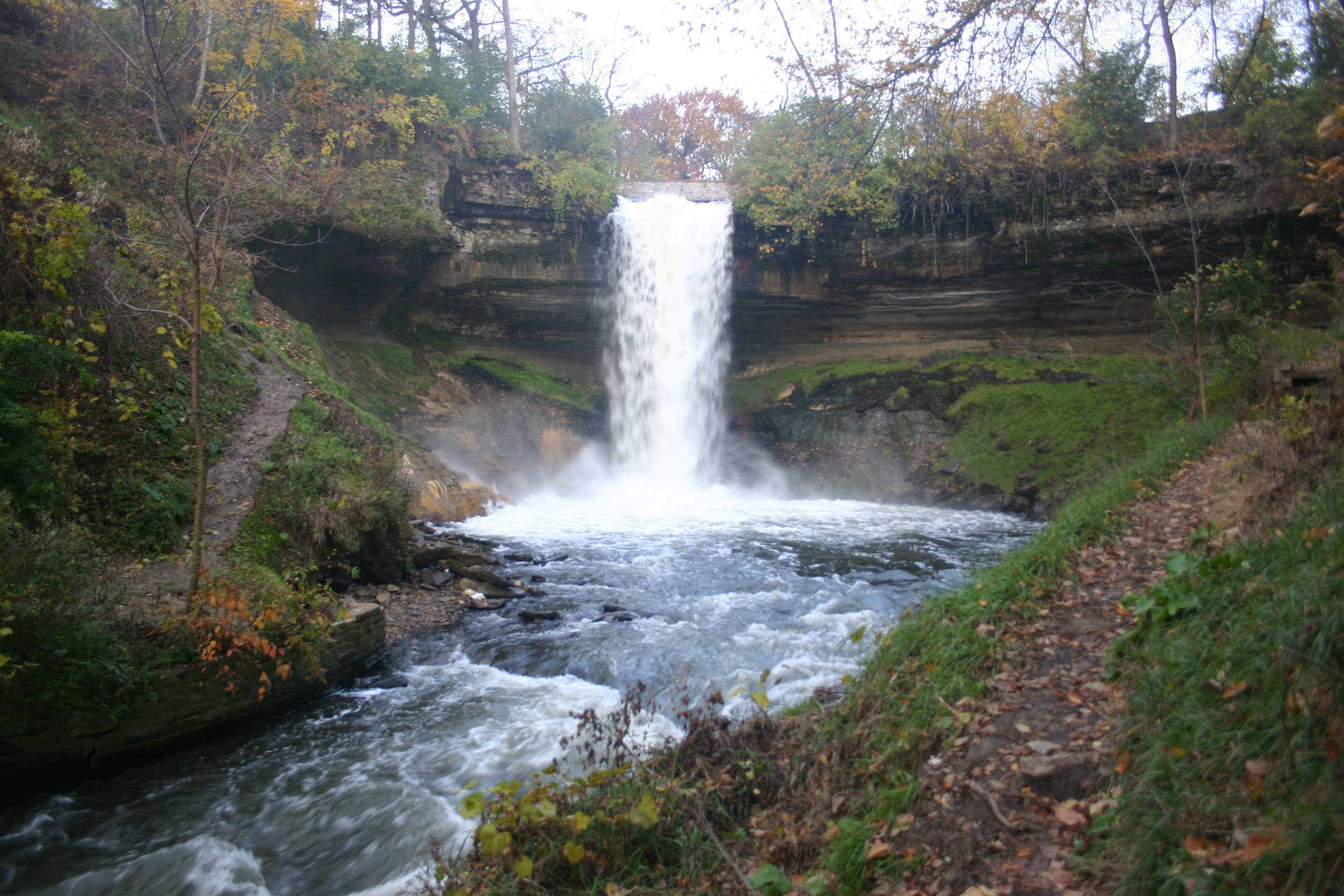 Minnehaha Falls, Minneapolis, Minnesota.